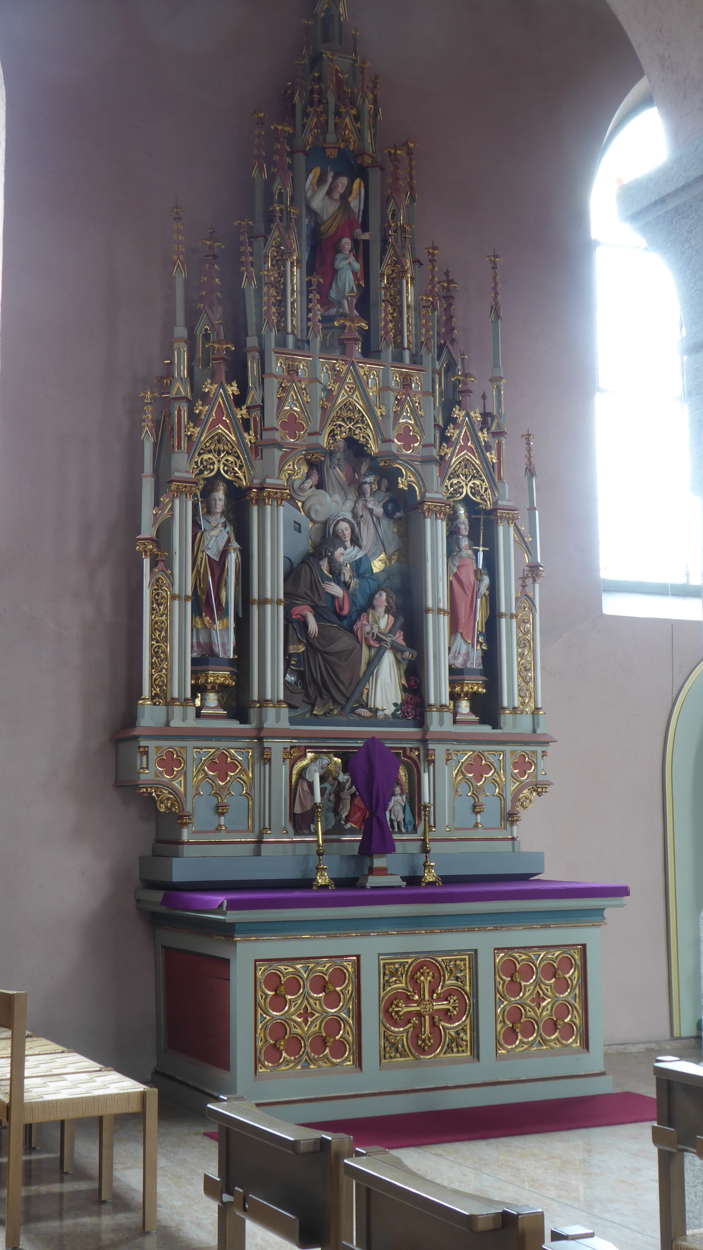 Pfarrkirche Eschen FL: Seitenaltar links